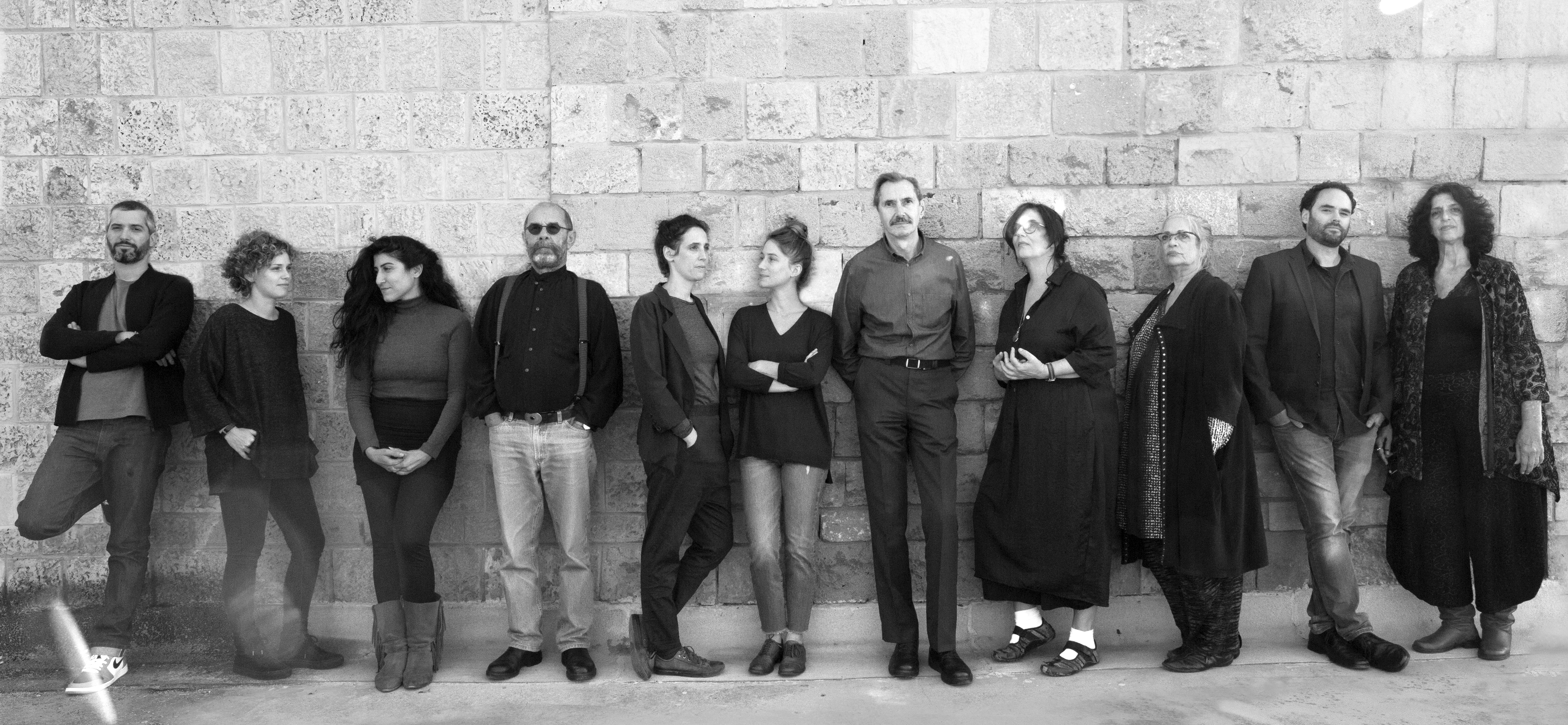 צוות המשרד